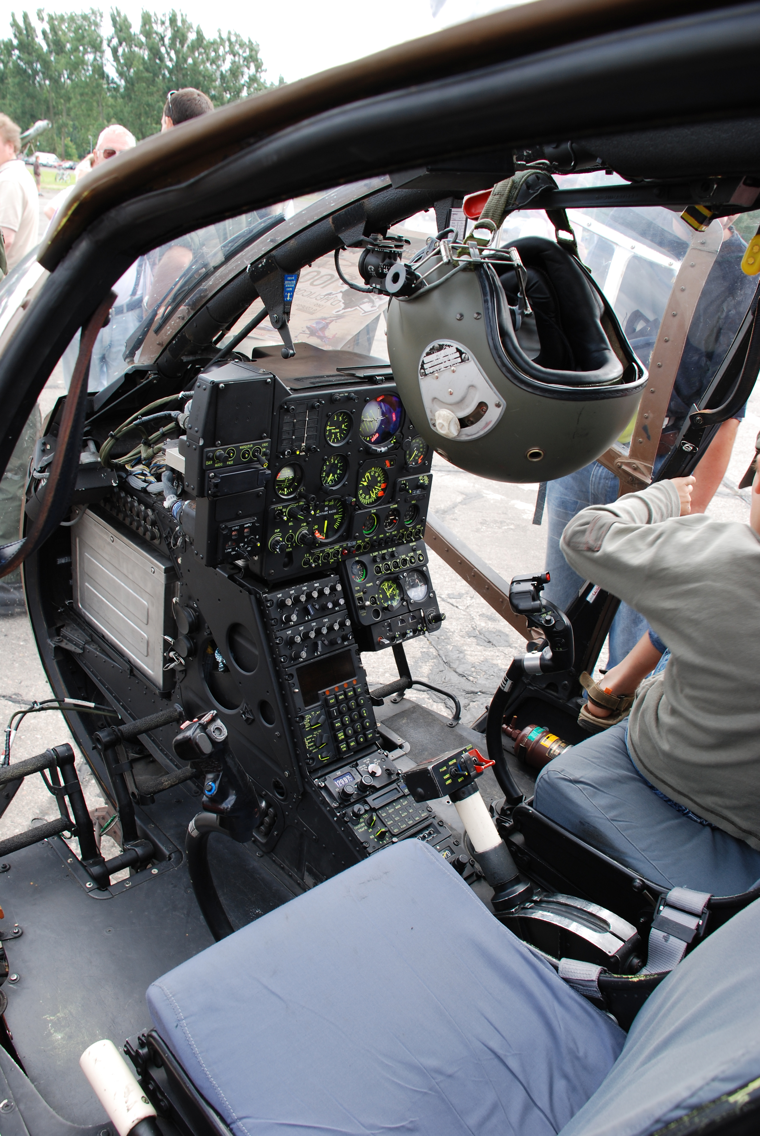 6122d713-1333-49bc-80c4-13d07ecd1fdc